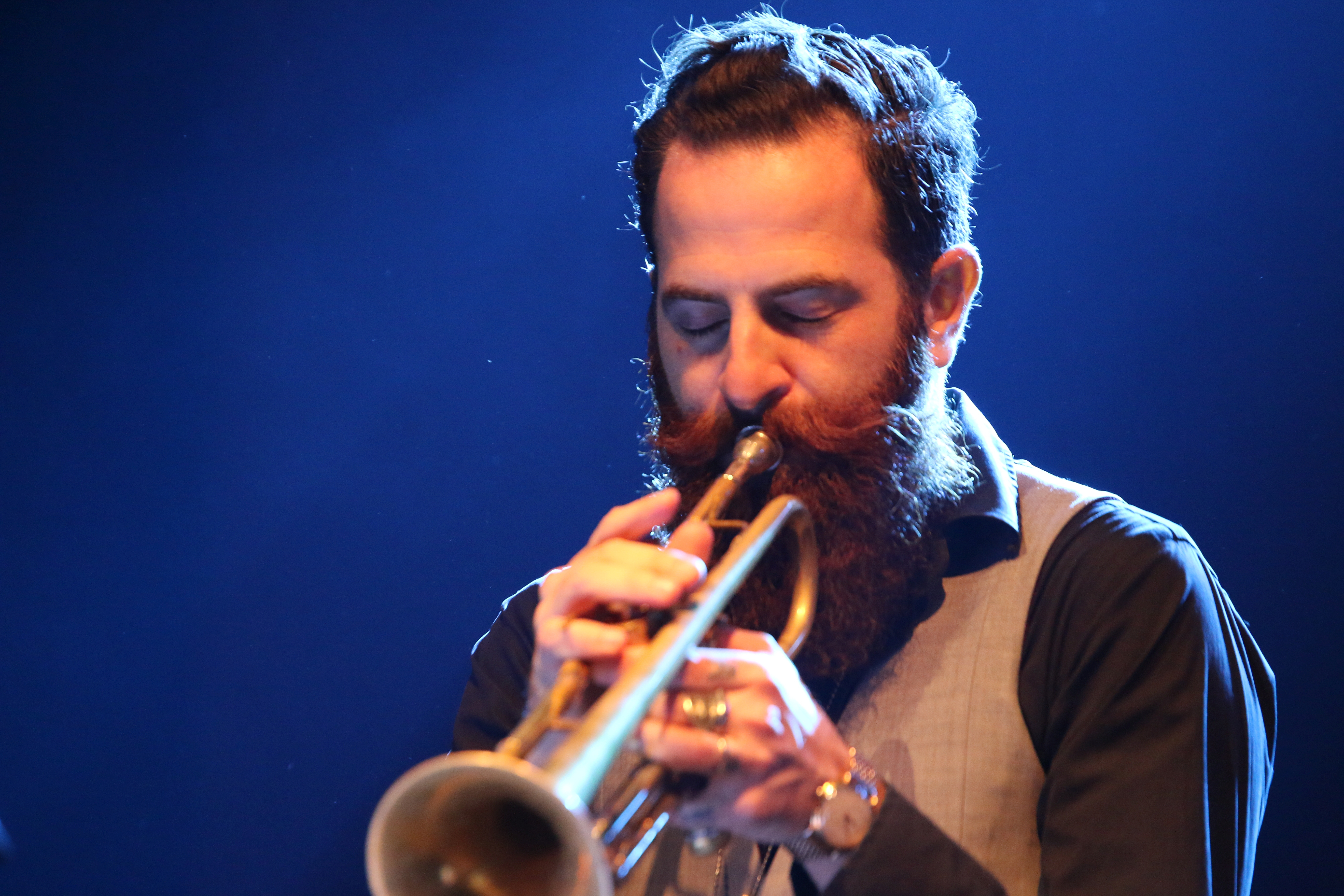 46. Deutsches Jazzfestival Frankfurt 2015: Mark Turner Quartett: Avishai Cohen